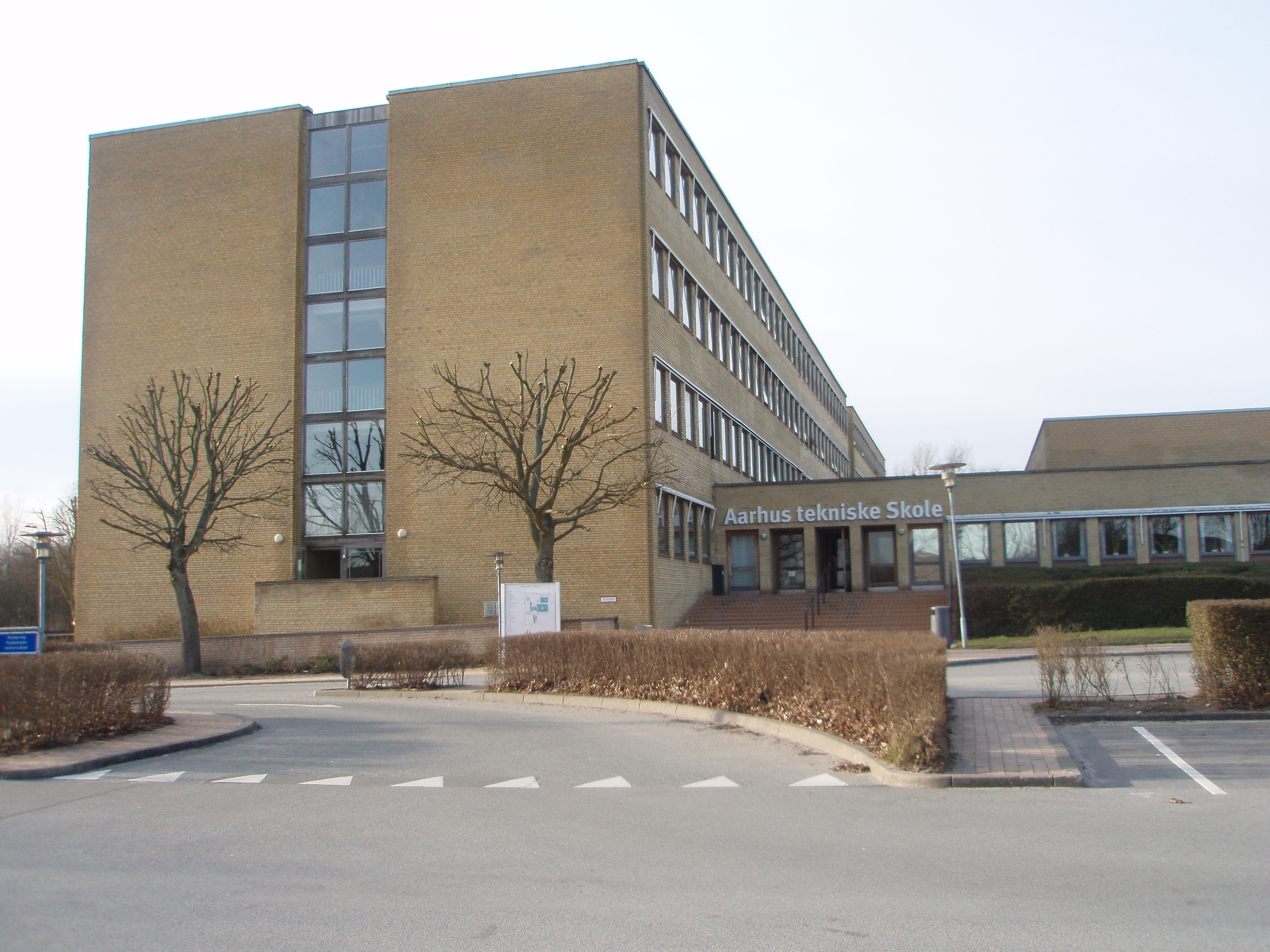 Århus tekniske Skole - hovedindgangen